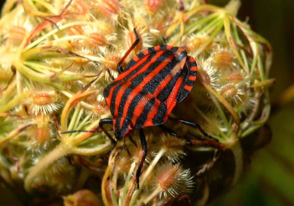 Streifenwanze